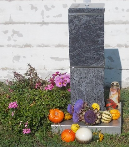 Brigitte Swoboda-Friedhof Apetlon